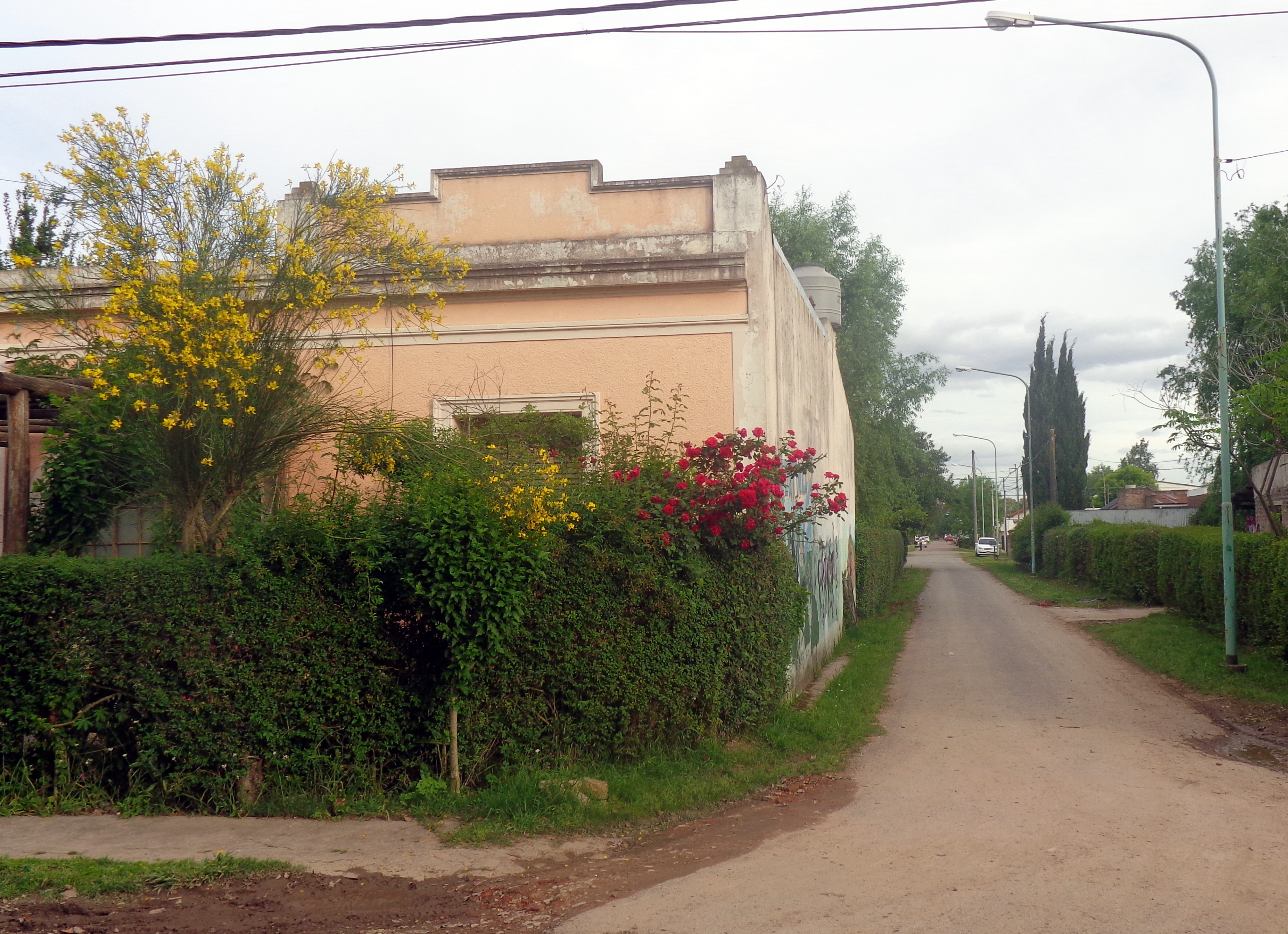 Cortines o Cortinez en el partido de Luján, provincia de Buenos Aires, Argentina.